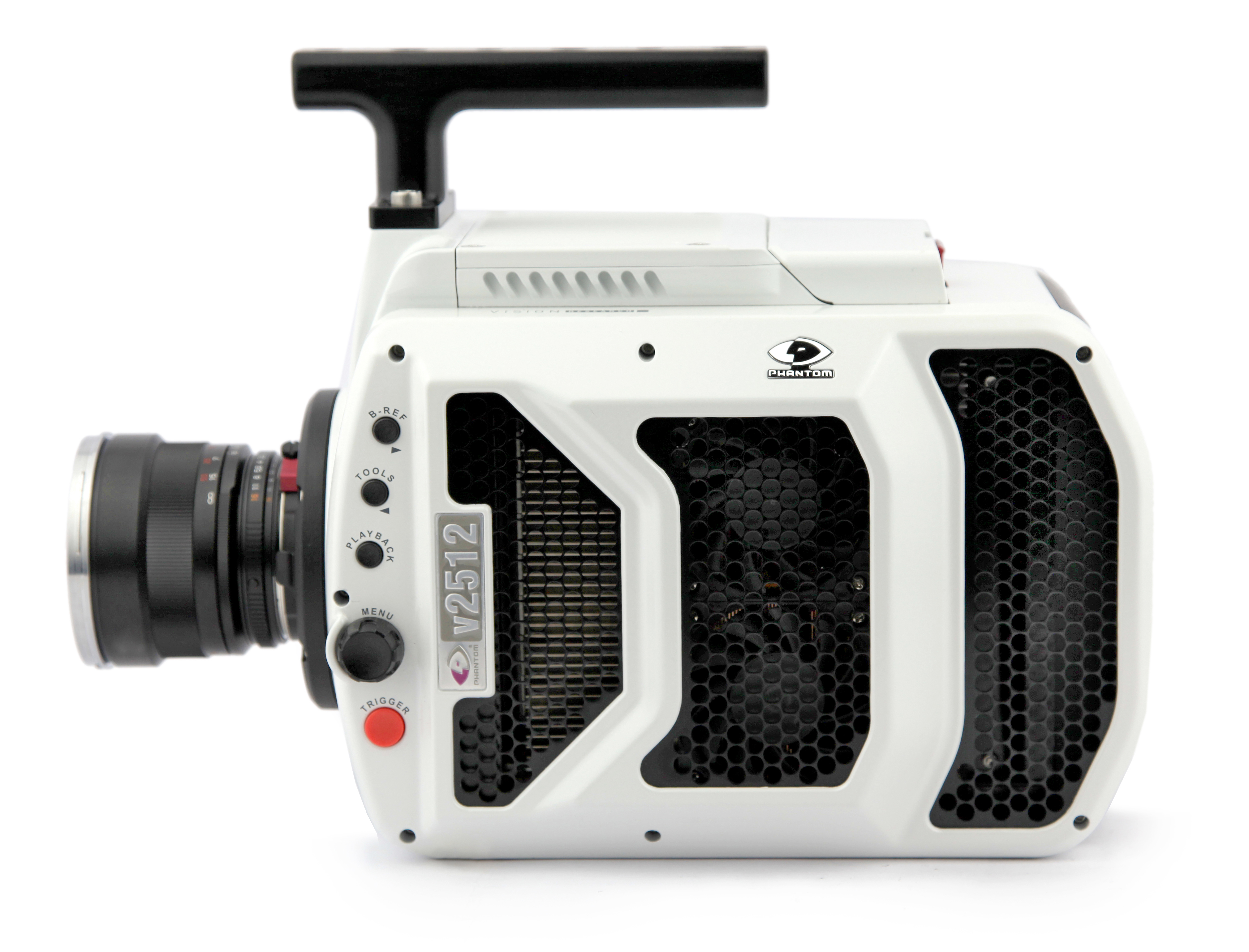 Caméra vidéo rapide Phantom v2512